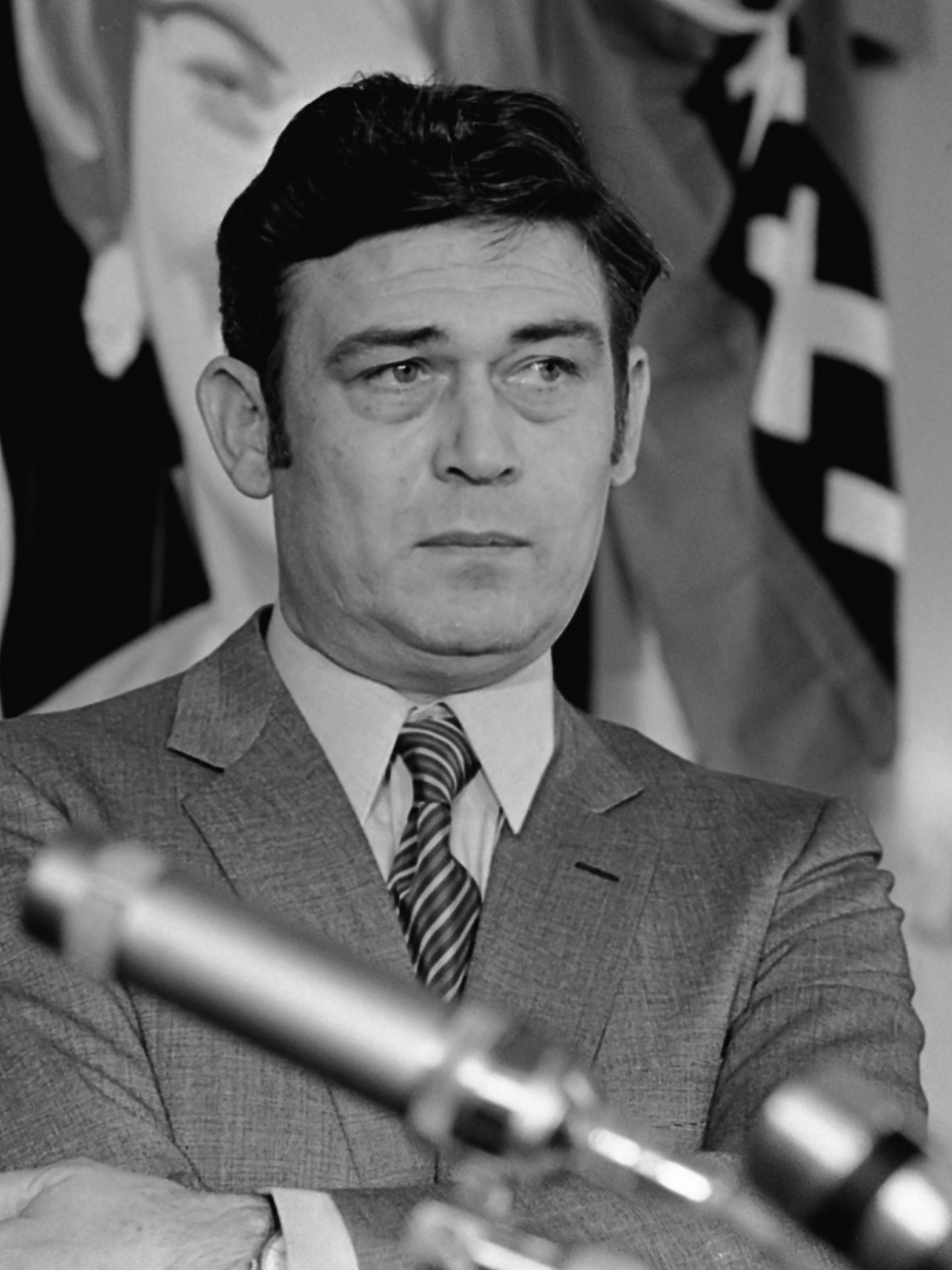 Medewerkers van de tv-serie "t 'Schaep met vijf pooten" ontvangen de Televizierring te Amsterdam; Joes Odufré 14 maart 1970